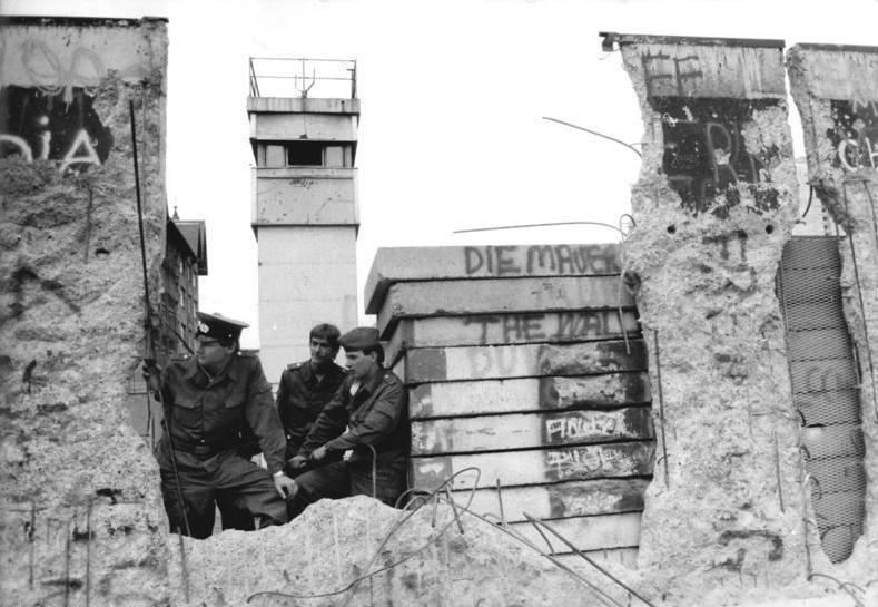 ADN-Uhlemann-19.4.90- Berlin: Vor einem guten haben Jahr war sie das wohl furchteinflösendste Bauwerk des Landes, die Mauer mit ihren zahlreichen Grenzbefestigungen. Heute prägen wegweisende Grenzer und verlassene Beobachtungstürme das Bild des durchlöcherten Schutzwalls zu Westberlin und der BRD.